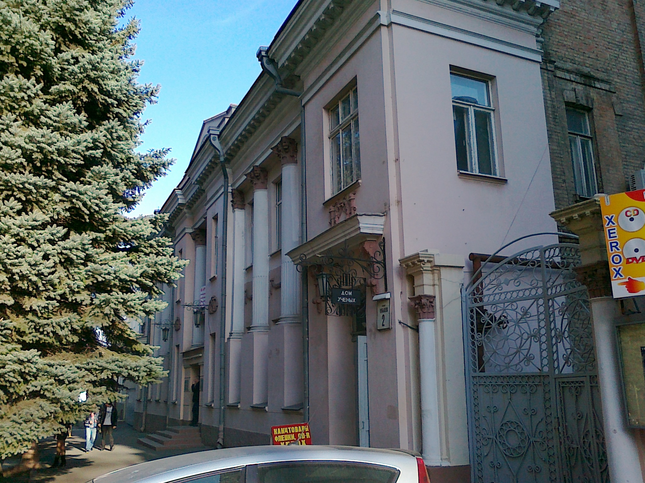 "Дом ученых"